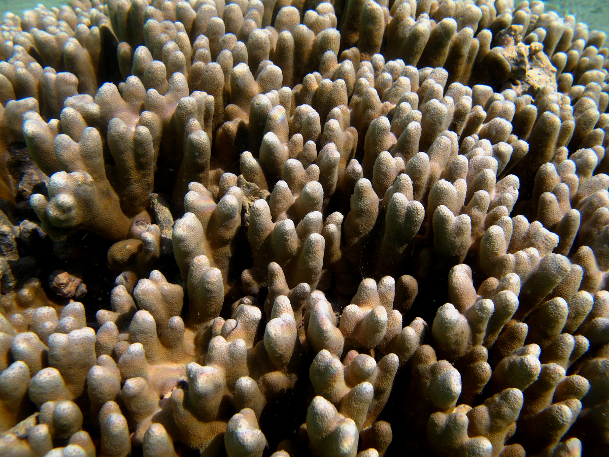 Une colonie de corail (Porites cylindrica) à la Réunion.